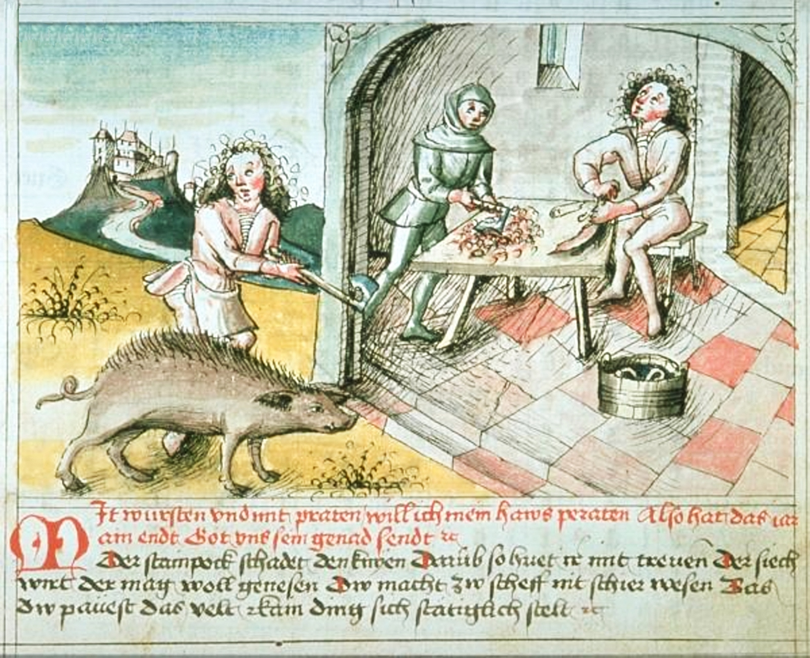 Dezember, Sammelhandschrift